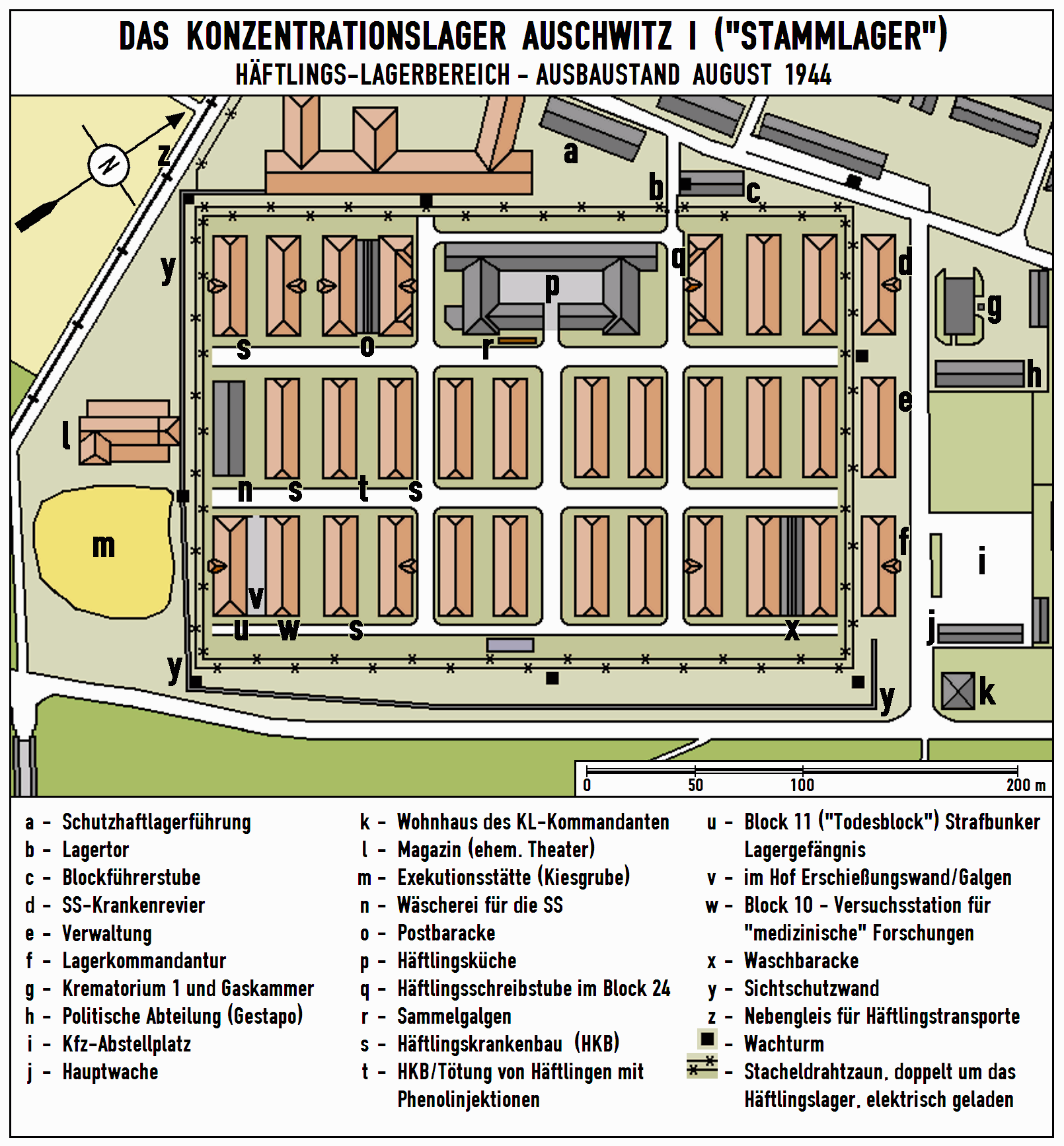 Der Plan zeigt das Konzentrations- und Vernichtungslager Auschwitz I (Stammlager) im Ausbaustand vom August 1944.